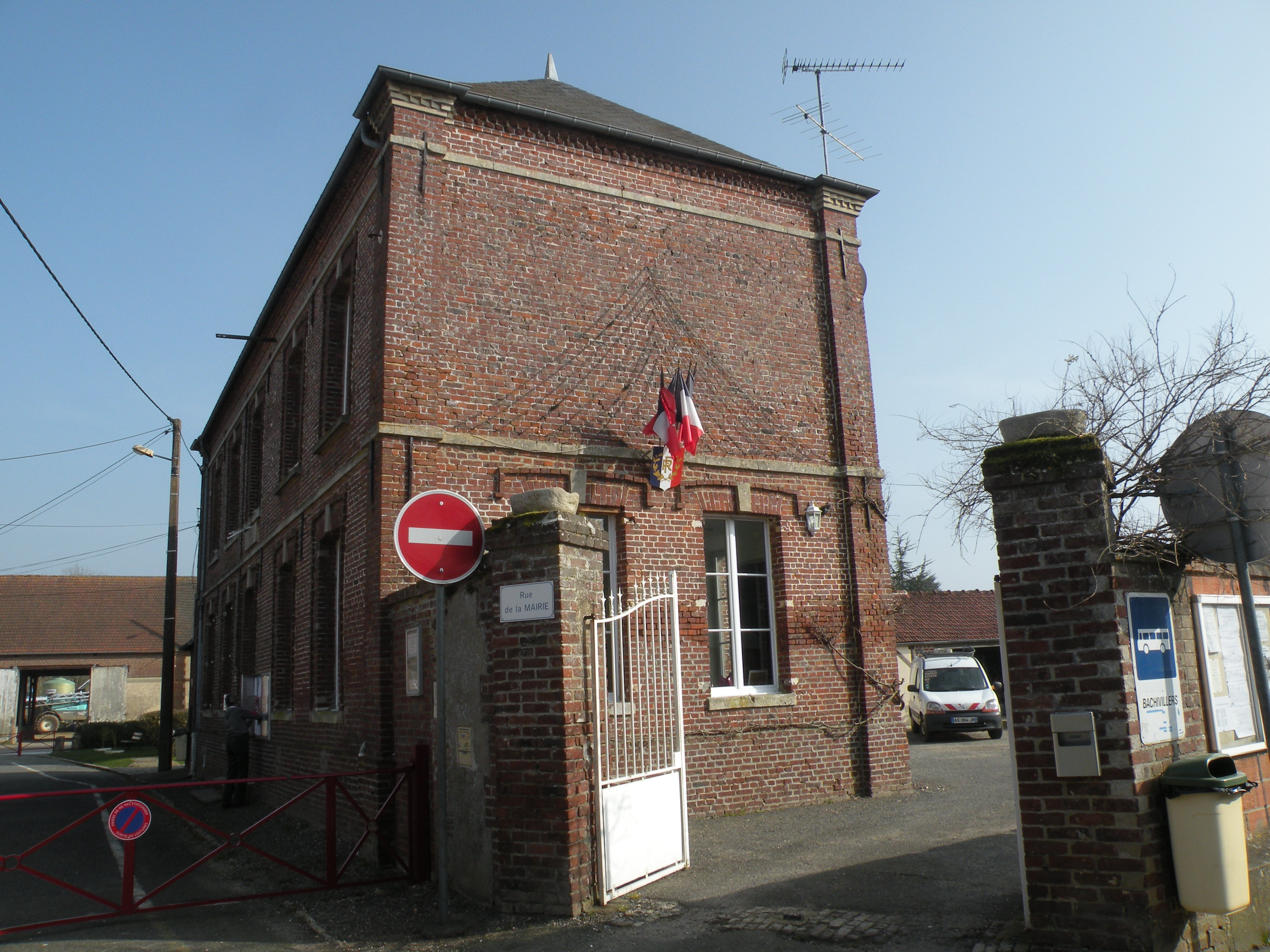 Bachivillers